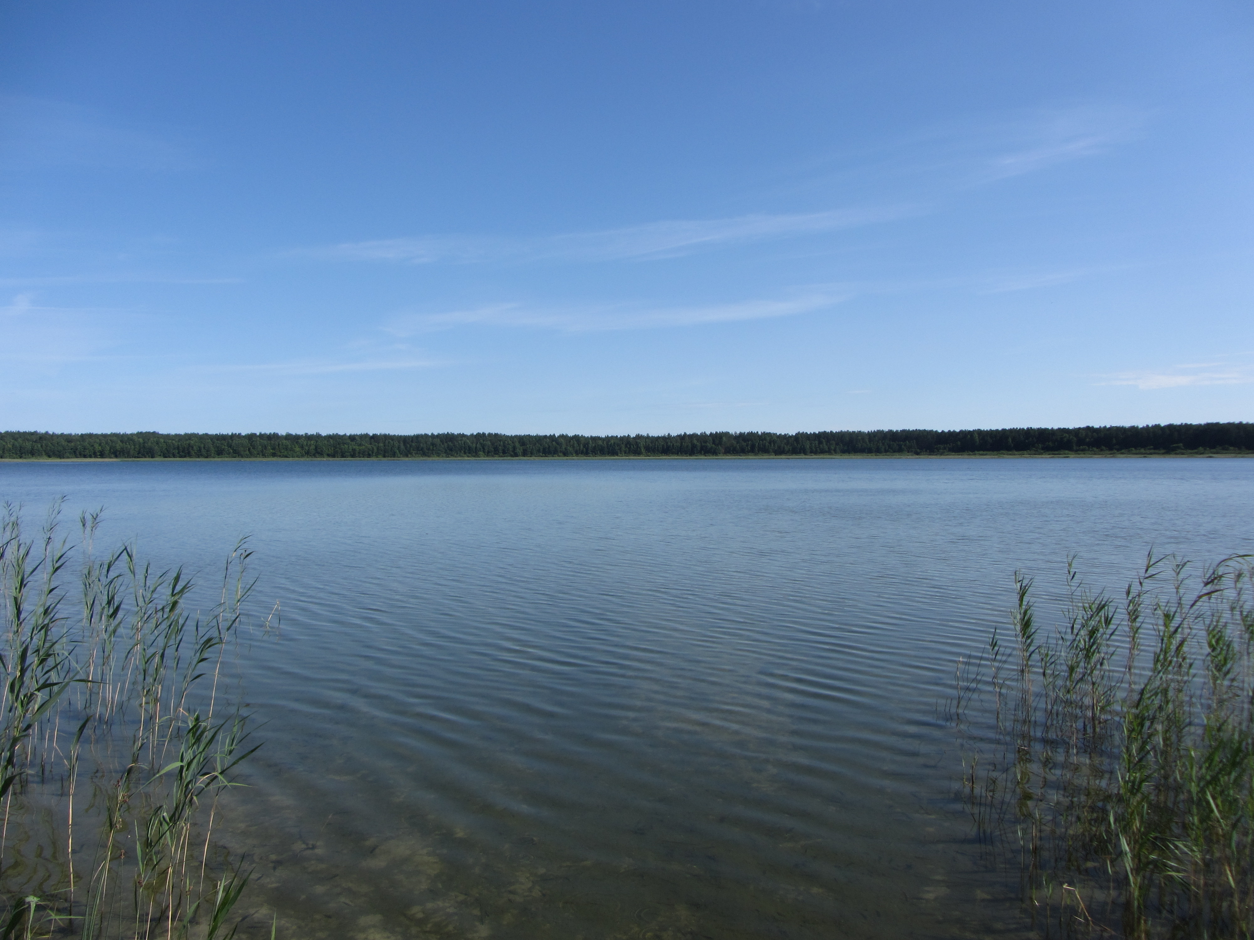 Varėnos sen., Lithuania